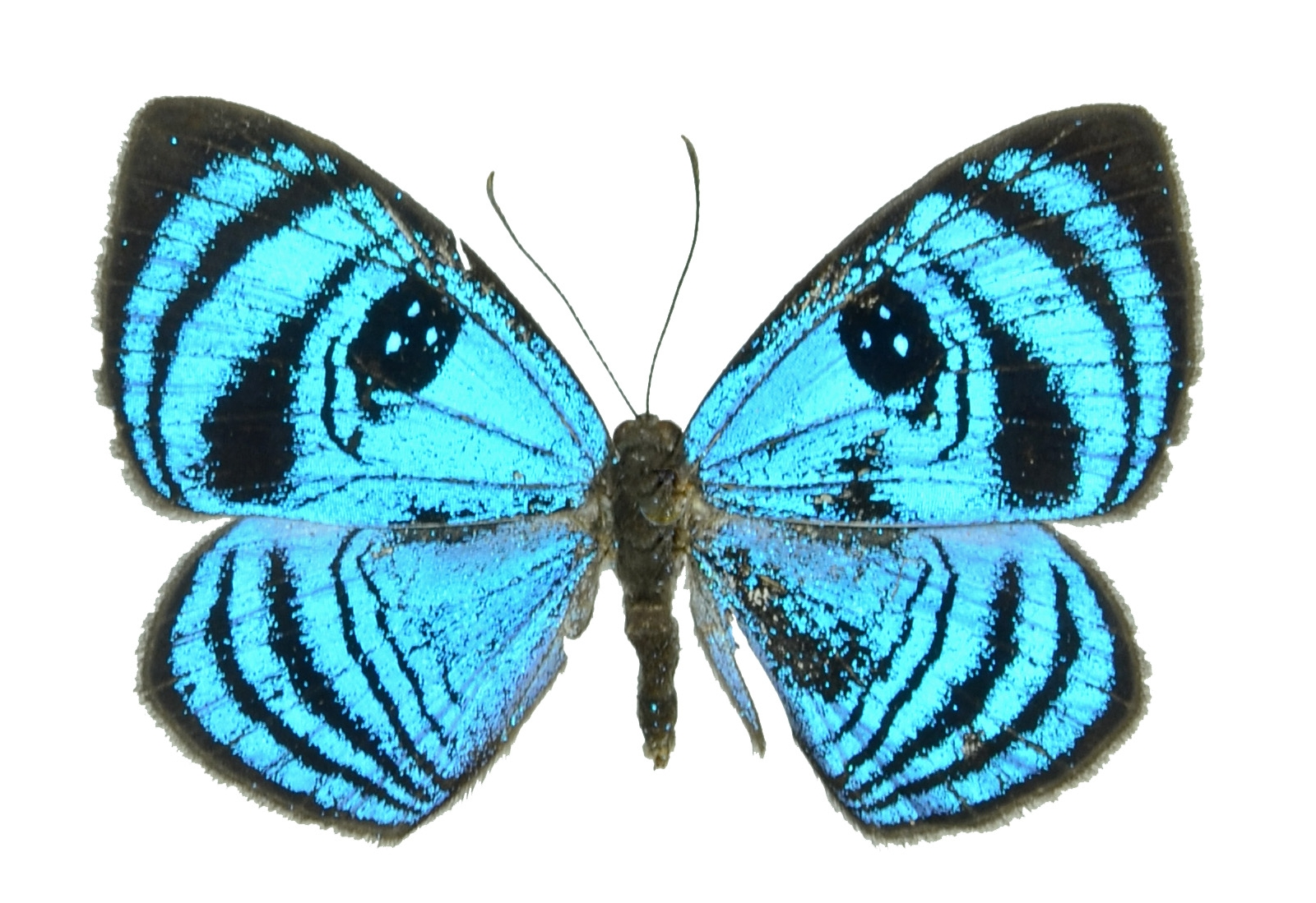 Semomesia croesus dorsal view. Eastern Ecuador